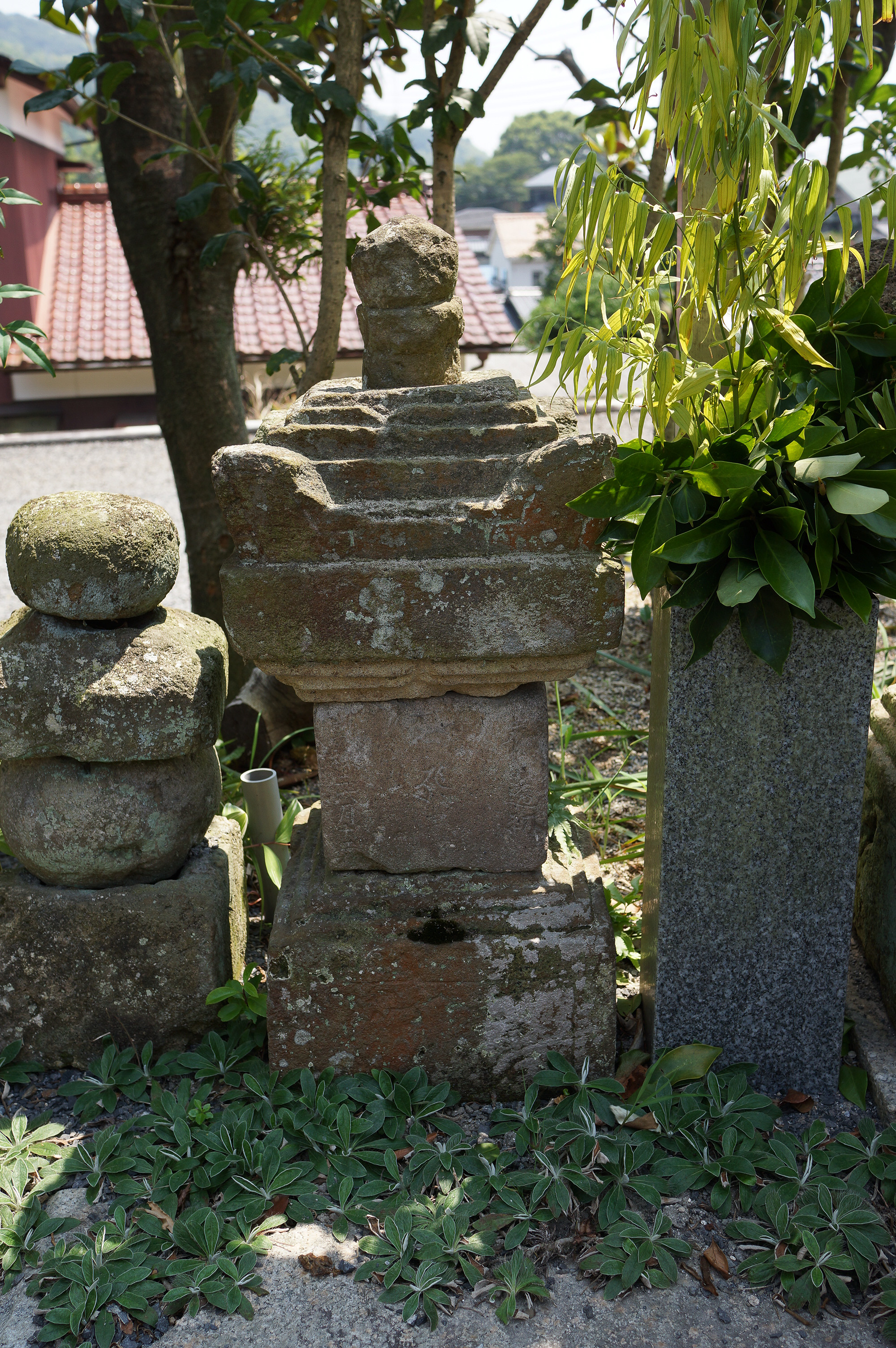 陶興昌供養の為の宝篋印塔。塔身には「春翁透初/享禄二六月十二日」とあり、興昌の法名と紀年が刻まれている。陶興房の長男で、若くして亡くなった興昌を供養するために造立された。